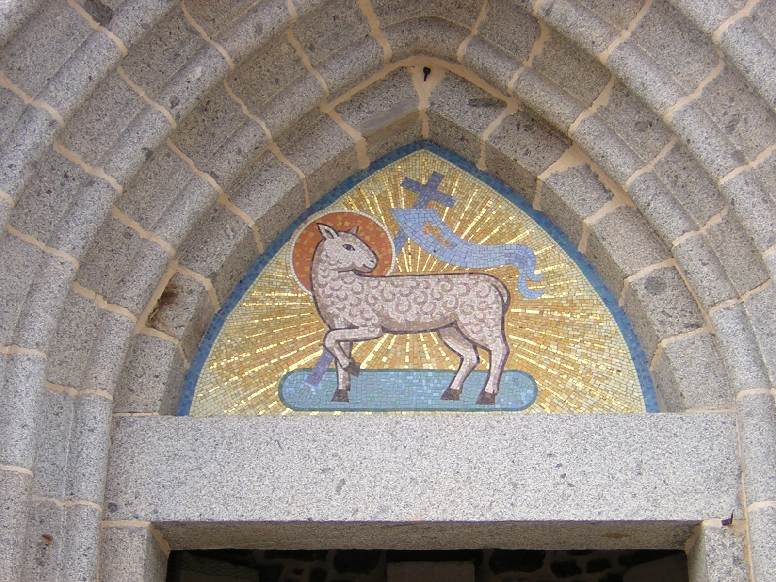 mairie de laignelet